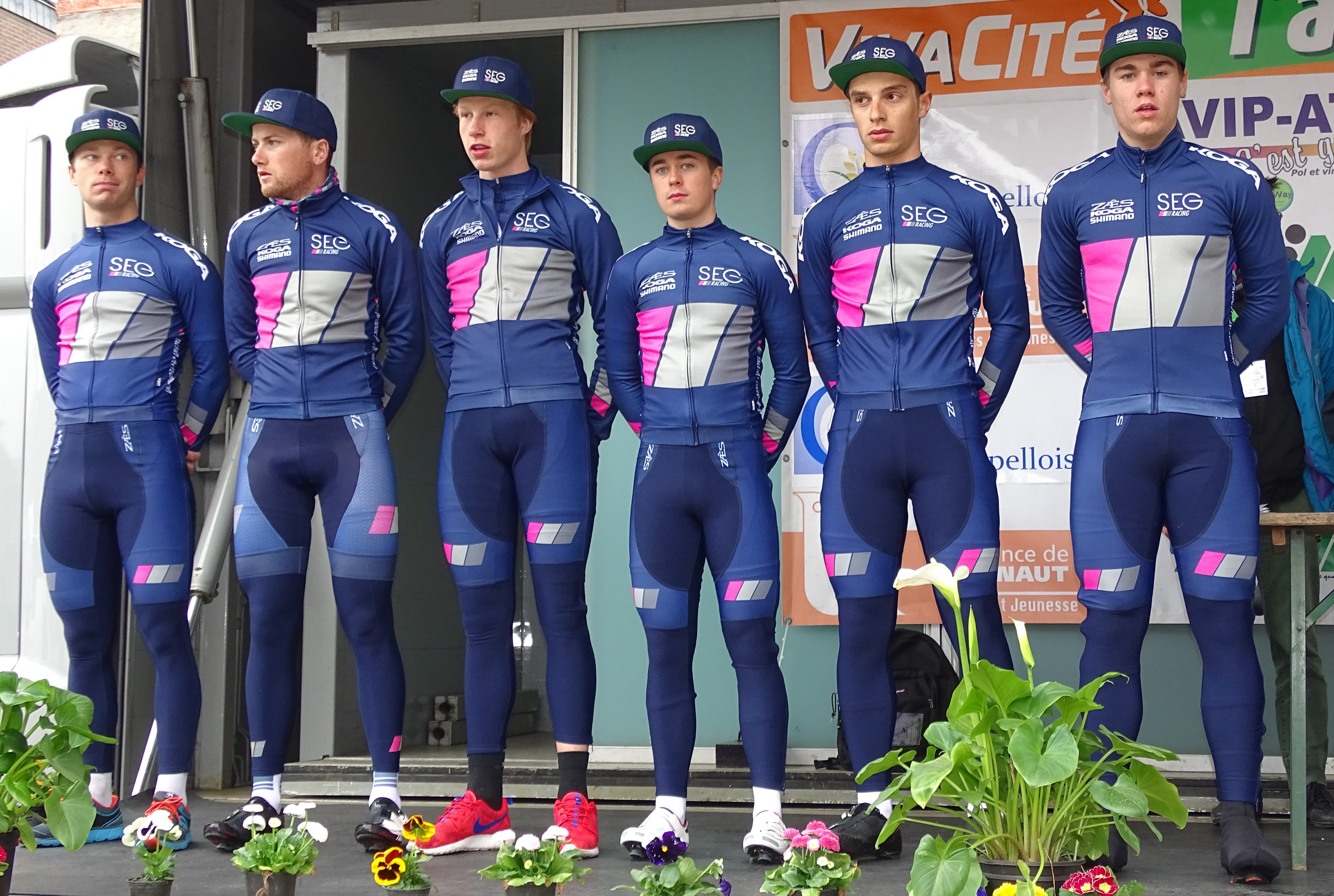 Triptyque des Monts et Châteaux 2015 Depicted team: SEG Racing